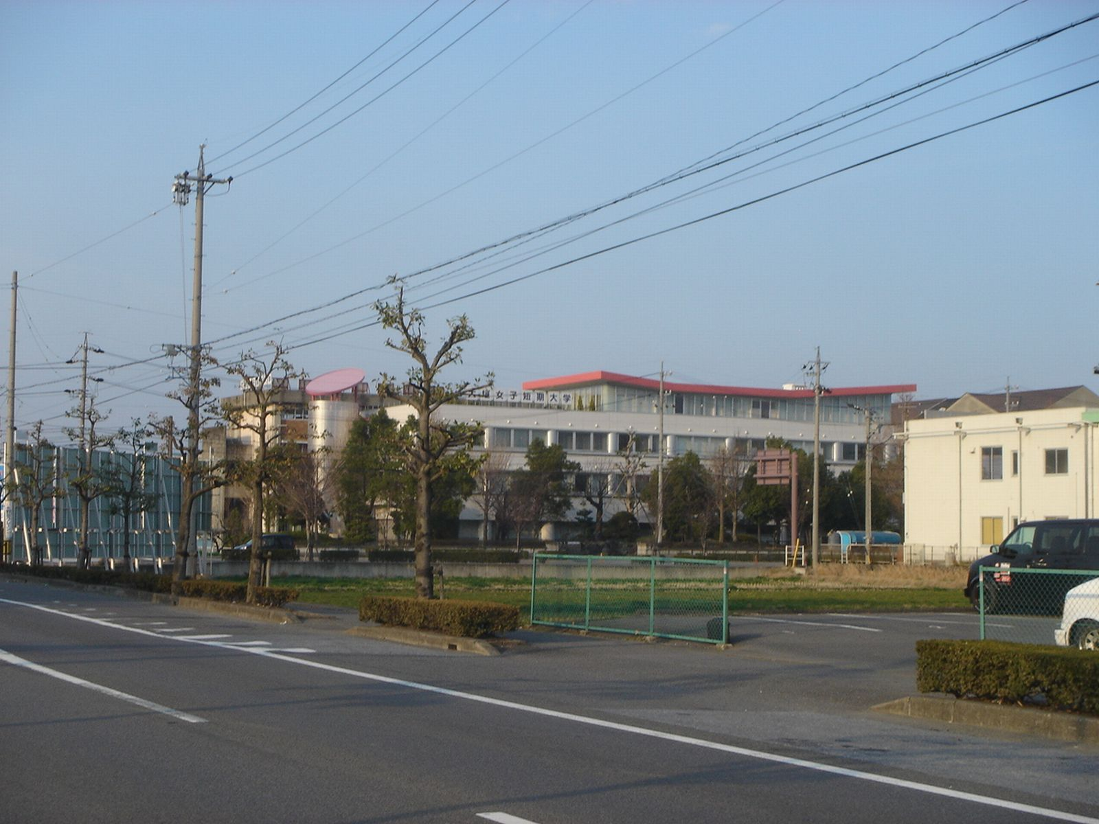 Ogaki Women's College(大垣女子短期大学),Ogaki,Gifu,Japan(岐阜県大垣市西之川町付近)で撮影。